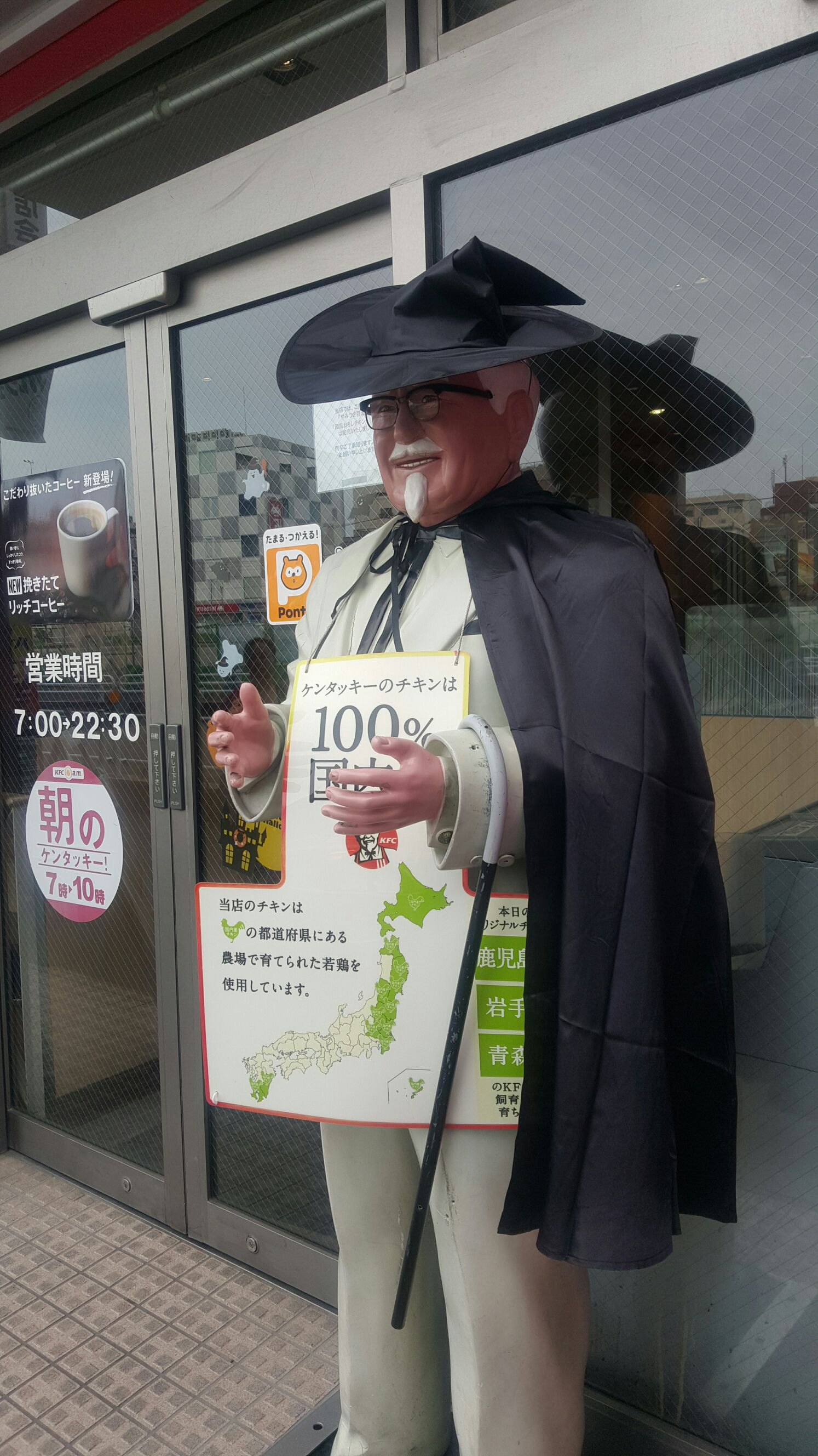 魔女の格好をするカーネル・サンダース